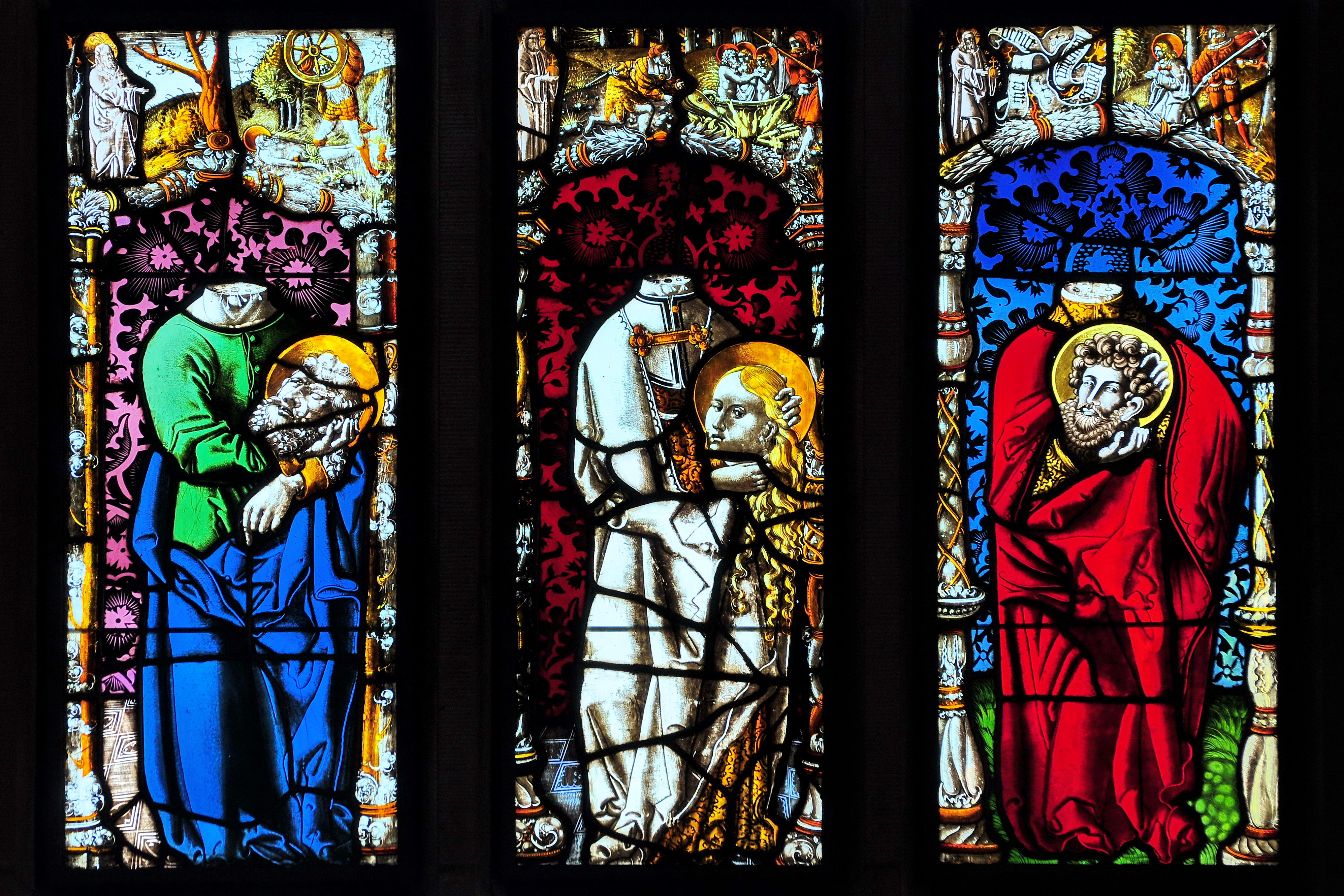 Reformierte Kirche mit Pfarrhaus, Lindenplatz in Elgg (Switzerland) : Saints Felix and Regula